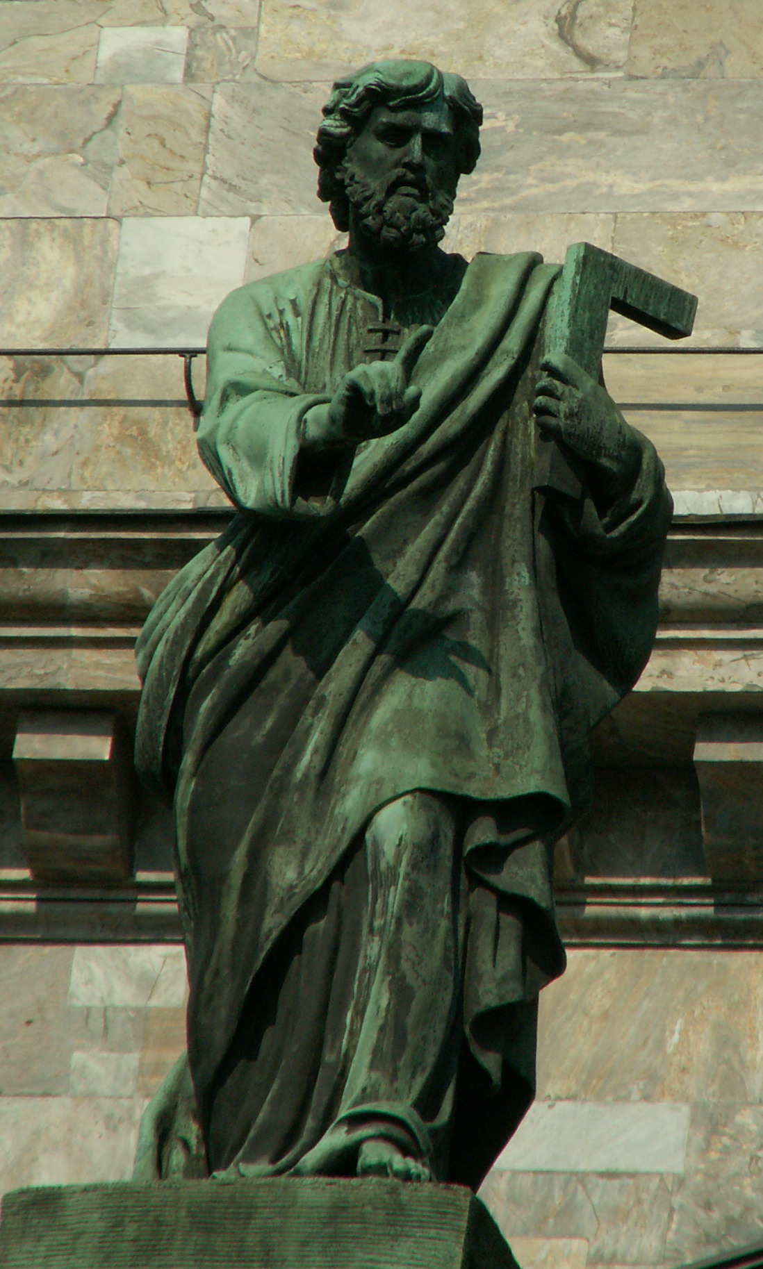 Statue of Apostle Thomas on Saint Isaac's cathedral. Saint Petersburg, Russia Статуя Апостола Фомы на Исаакиевском соборе. Санкт-Петербург. Россия.